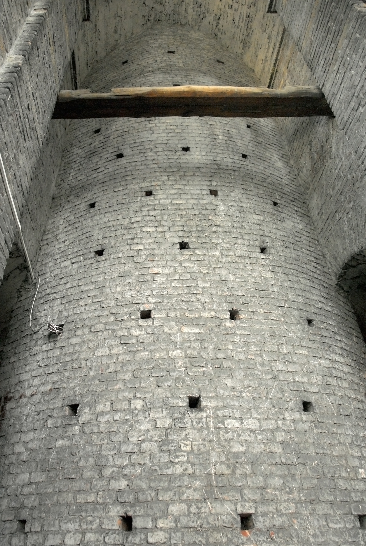 Внутренняя башня в Смольном соборе.